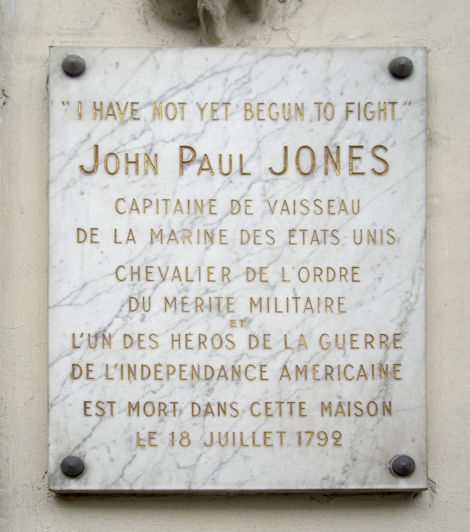 Plaque apposée au n° 19 de la rue de Tournon, Paris 6e.« "I have not yet begun to fight." John Paul Jones, capitaine de vaisseau de la marine des États-Unis, chevalier de l'ordre du Mérite militaire et l'un des héros de la guerre de l'indépendance américaine, est mort dans cette maison le 18 juillet 1792. »